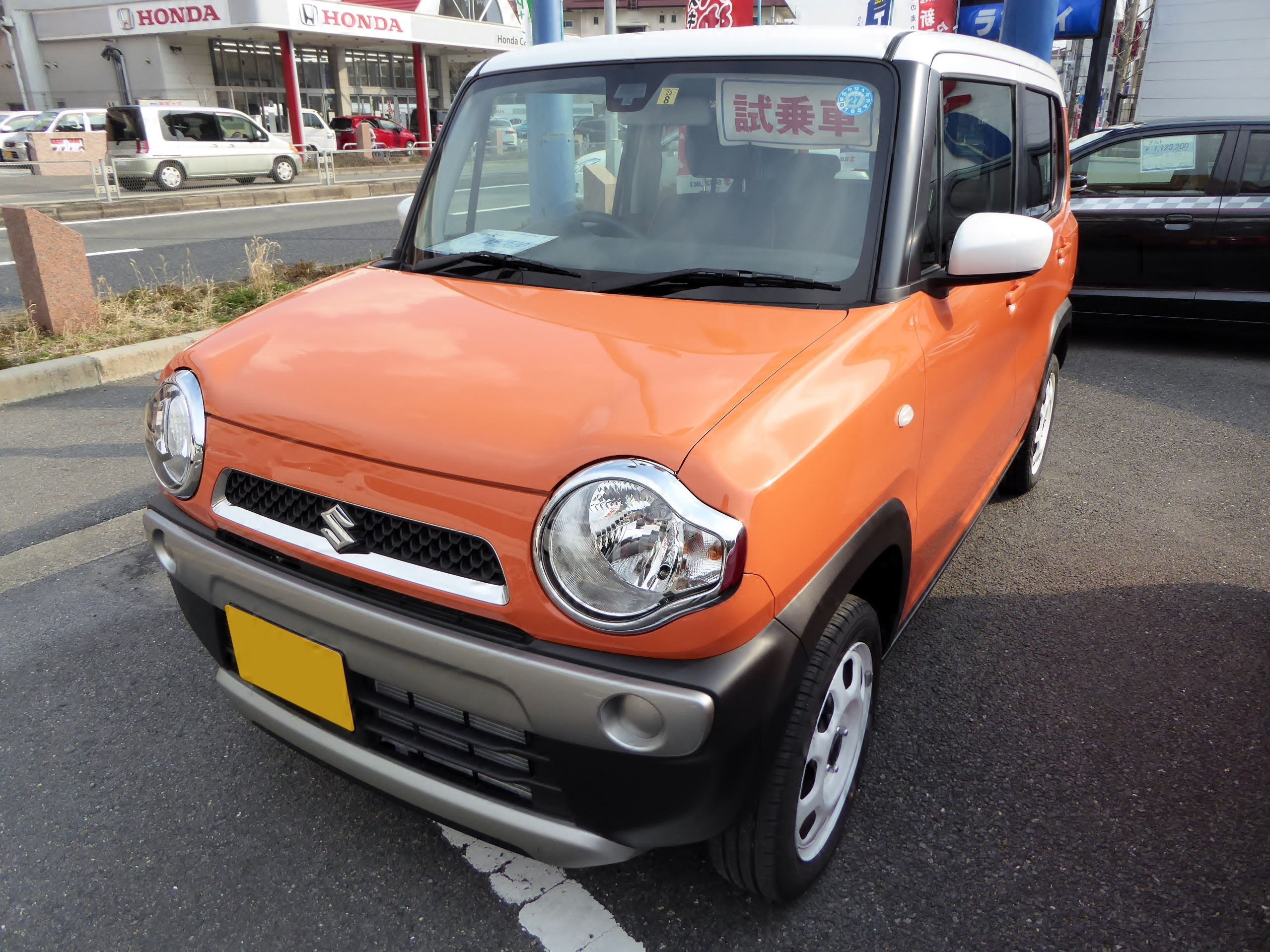 MR31S型スズキ・ハスラーGターボをフロントから撮影。